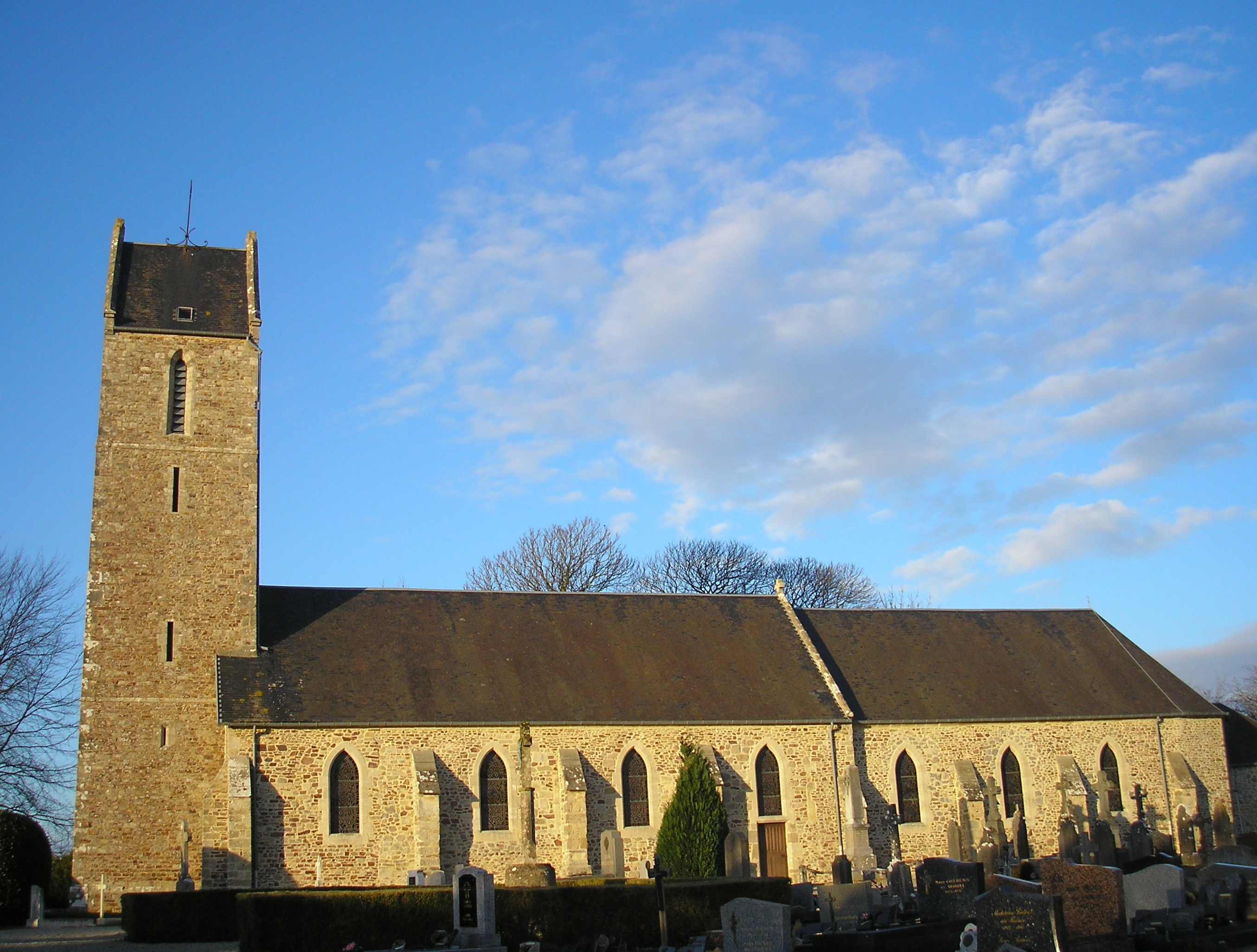 Saint-Germain-sur-Sèves (Normandie, France). L'église Saint-Germain.